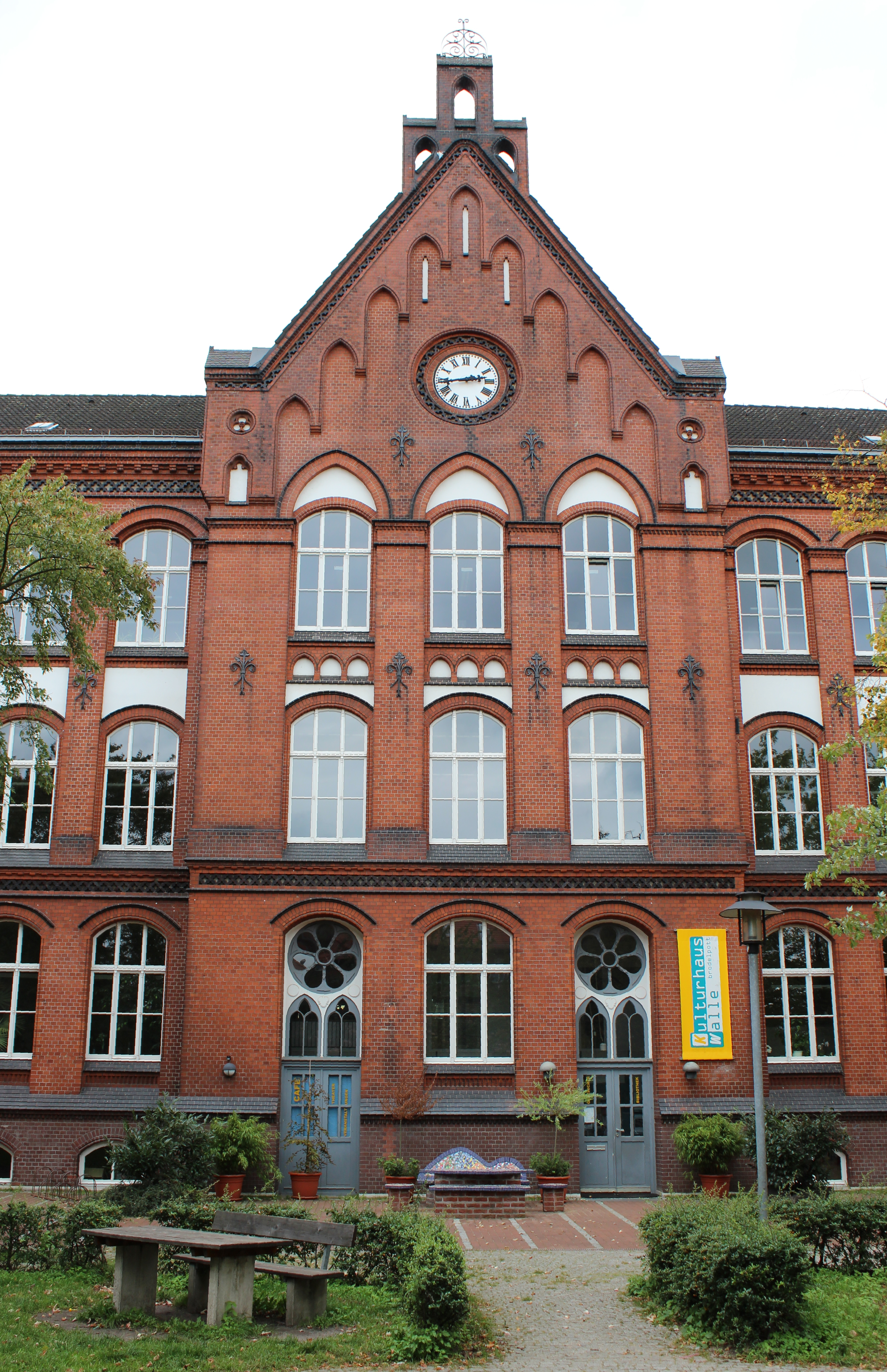 Freischule, Schulzentrum Walle in Bremen, Schleswiger Straße 4 / Theodorstraße 26.Das abgebildete Objekt ist ein geschütztes Kulturdenkmal in der Freien Hansestadt Bremen, mit der Nr. 1105 beim Landesamt für Denkmalpflege registriert.